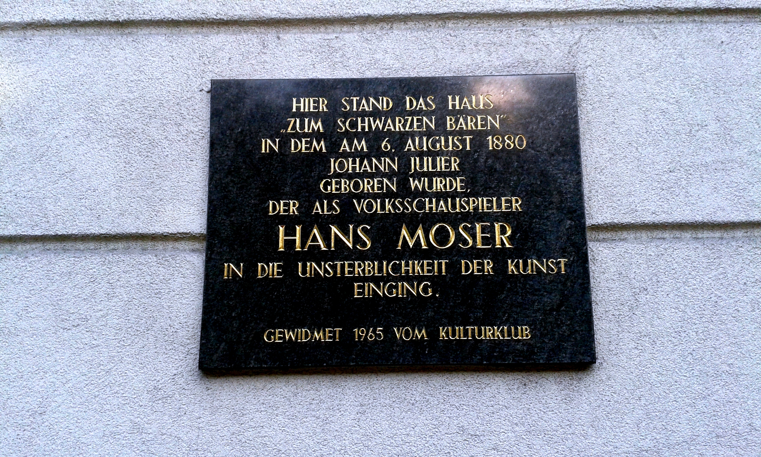 Hans Moser / Gedenktafel an seinem Geburtshaus in Wien